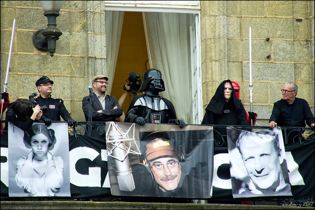 Tropa Korriban en un desfile de Star Wars en Santiago de Compostela, España, el 27 de mayo de 2017.